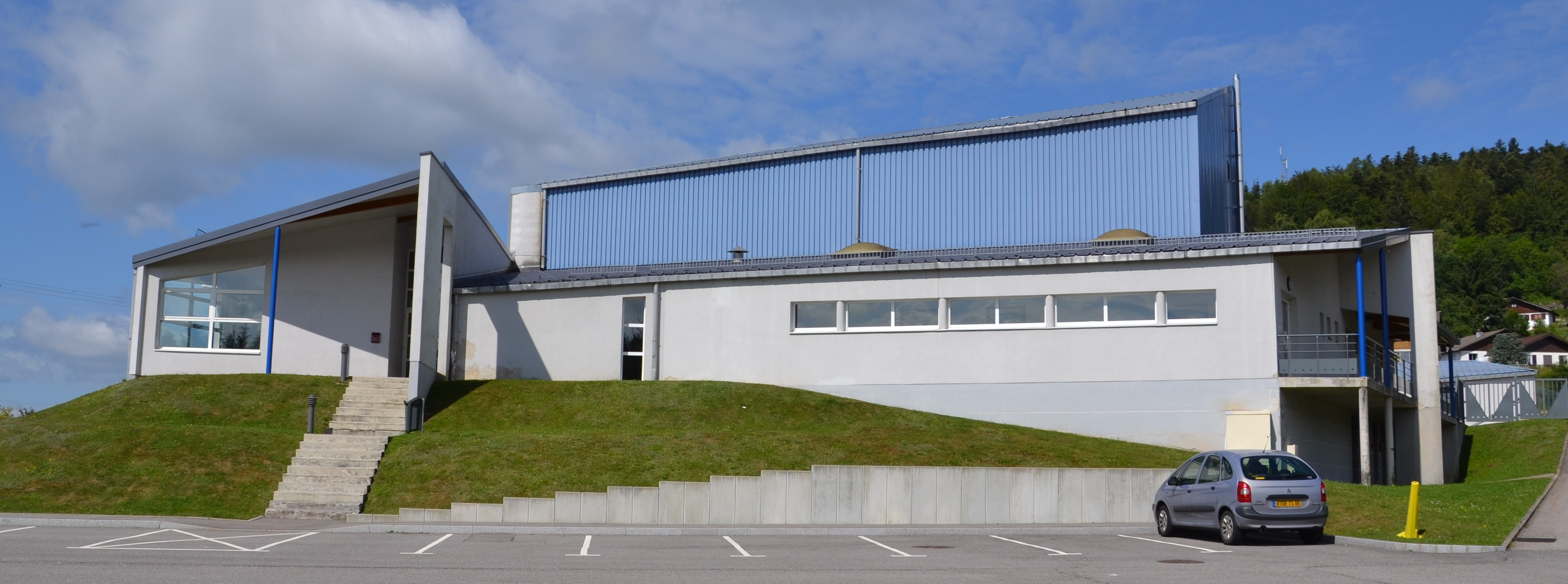 Gymnase du Tholy, Vosges.